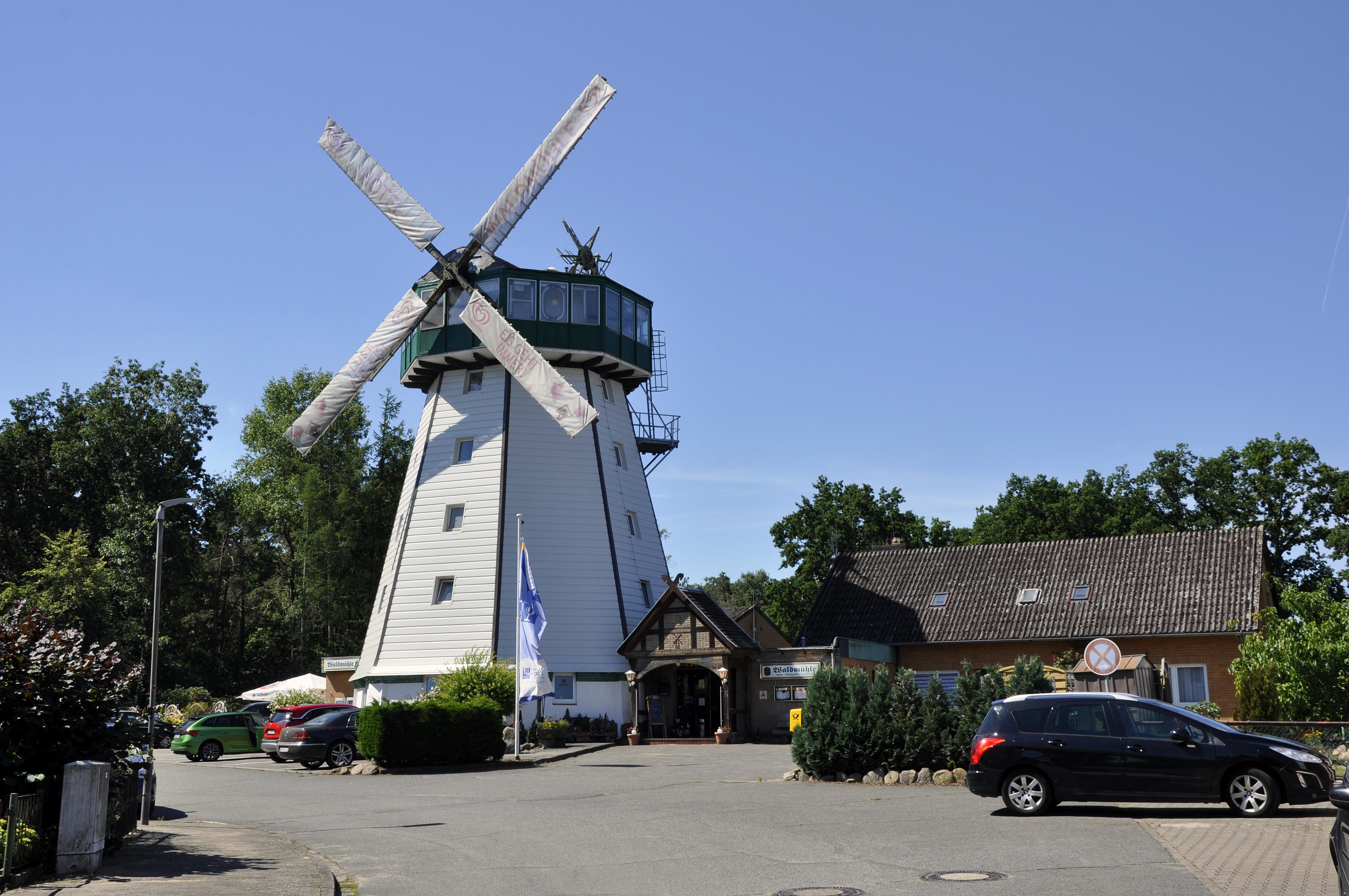 Suhlendorf, Hotel und Restaurant Waldmühle